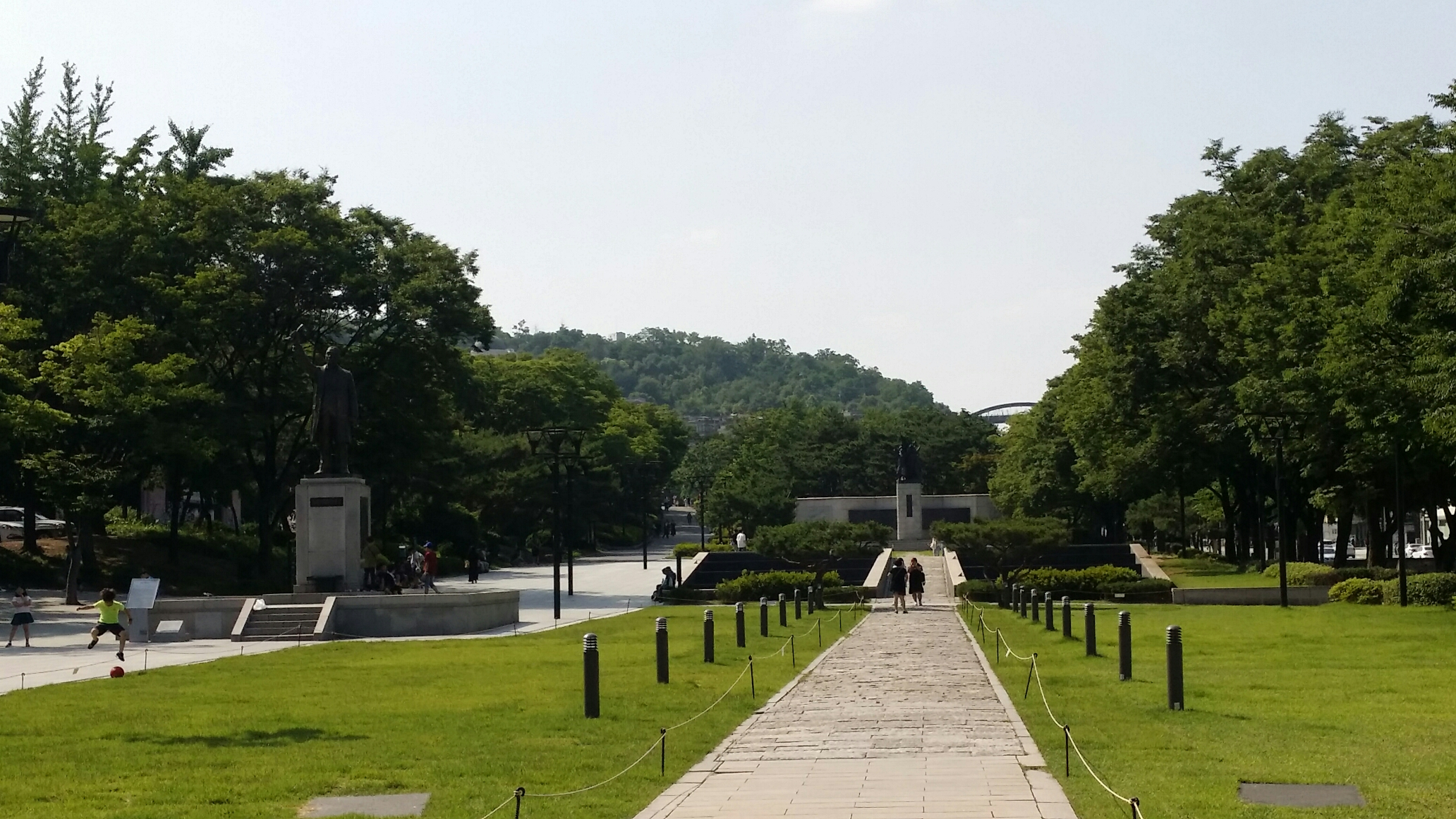 대한민국 서울특별시 서대문구 현저동에 위치한 독립공원의 모습